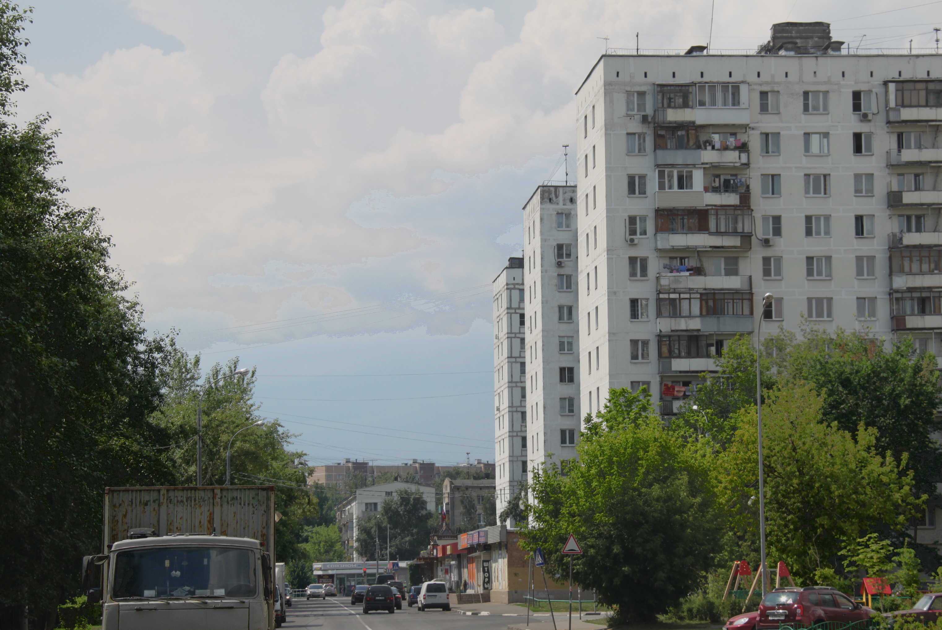 Ангарская улица в Дмитровском районе. Вид к пересечению с Коровинском шоссе